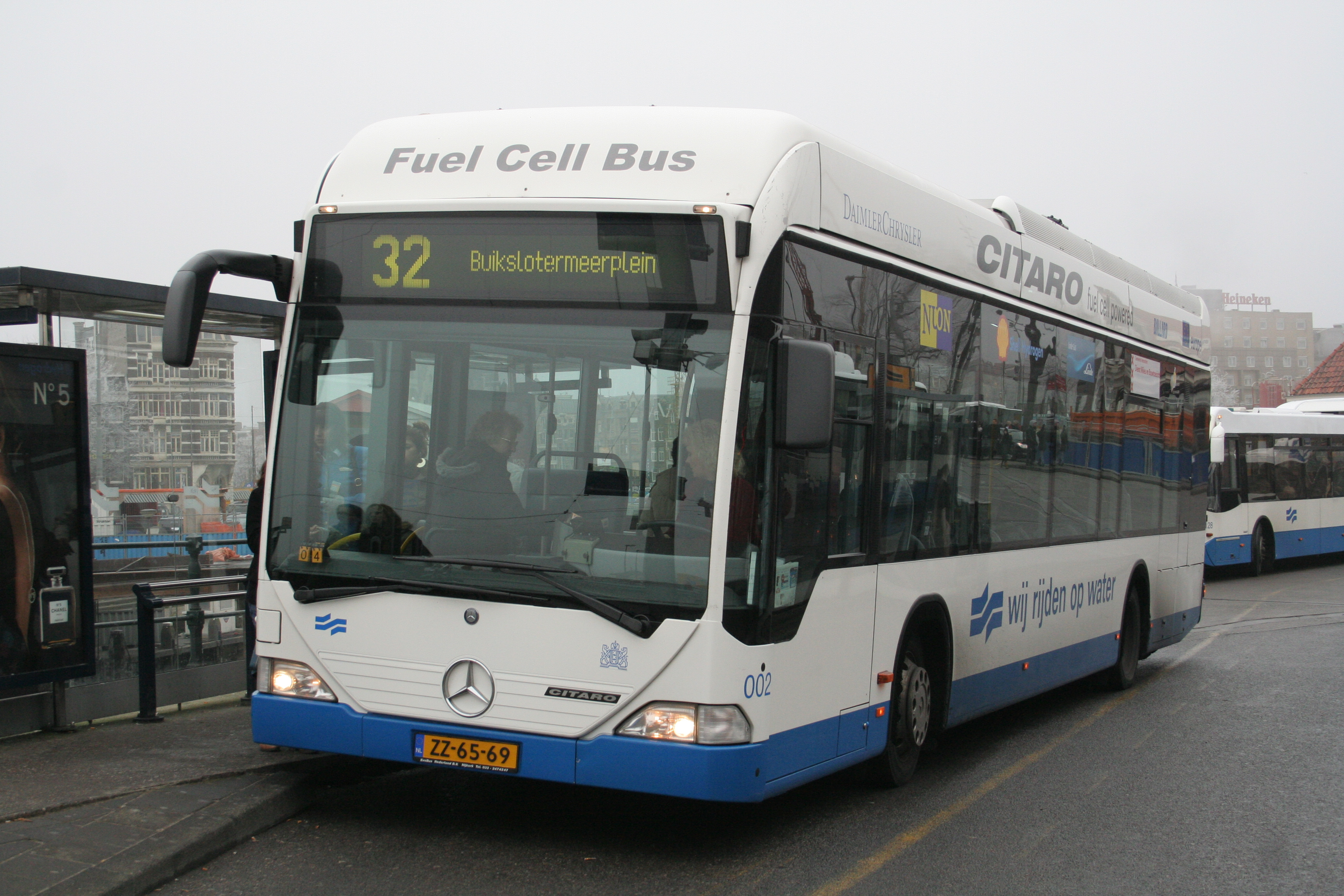 Citaro waterstofbus voor GVB